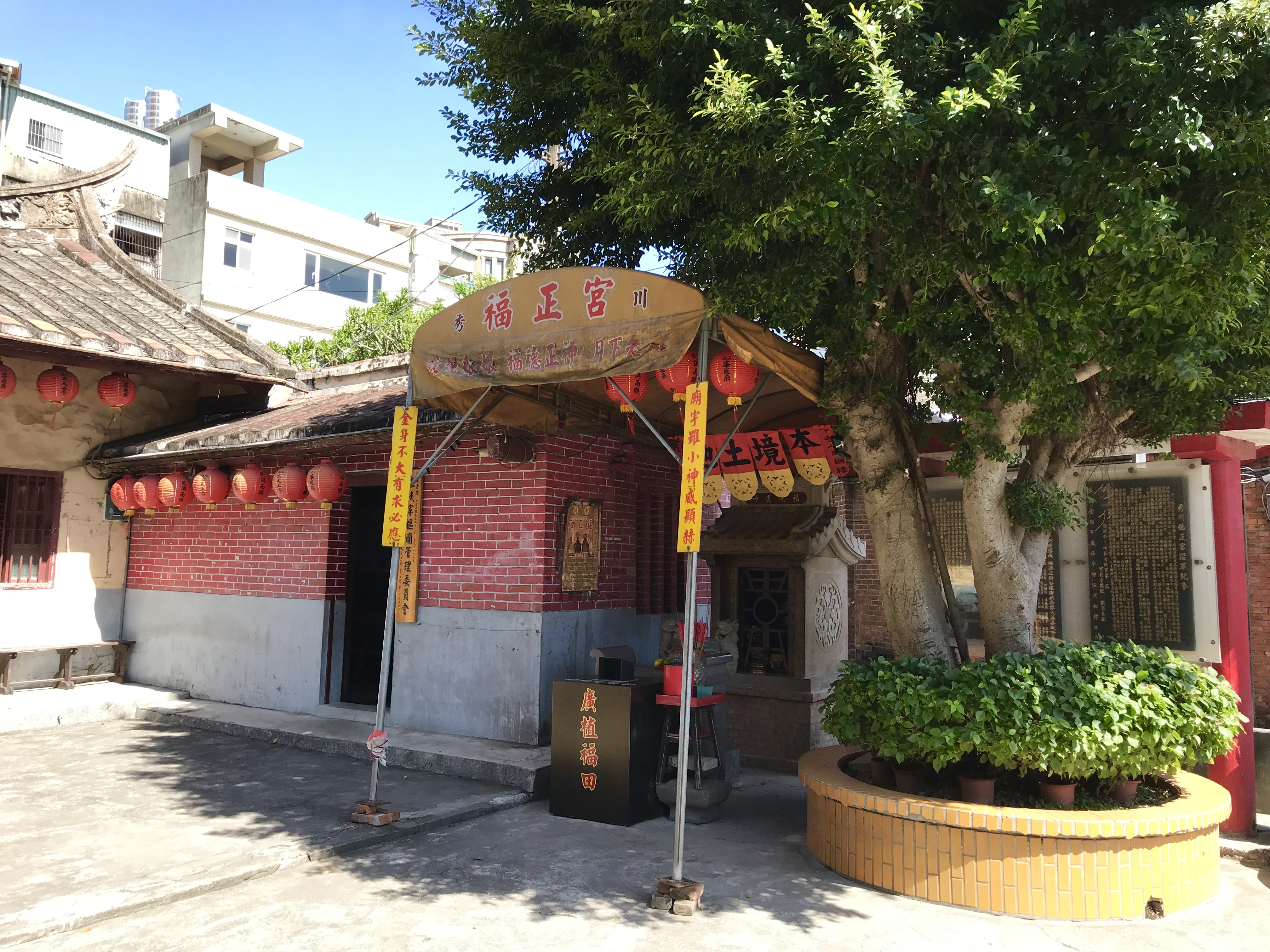 中文（台灣）: 三峽宰樞廟旁的秀川福正宮